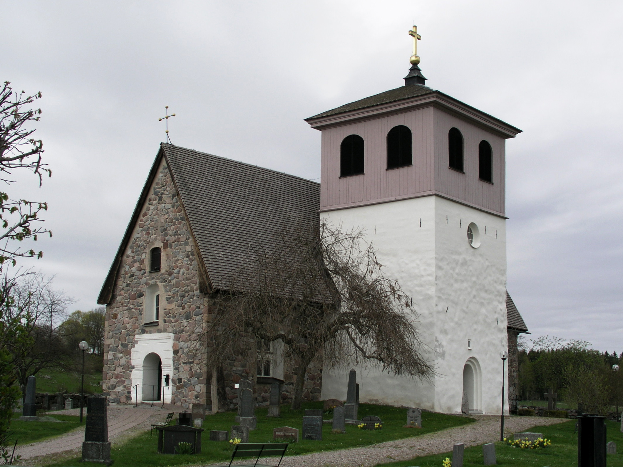 Husby-Sjuhundra kyrka, Norrtälje kommun, Diocese of Uppsala, Sweden